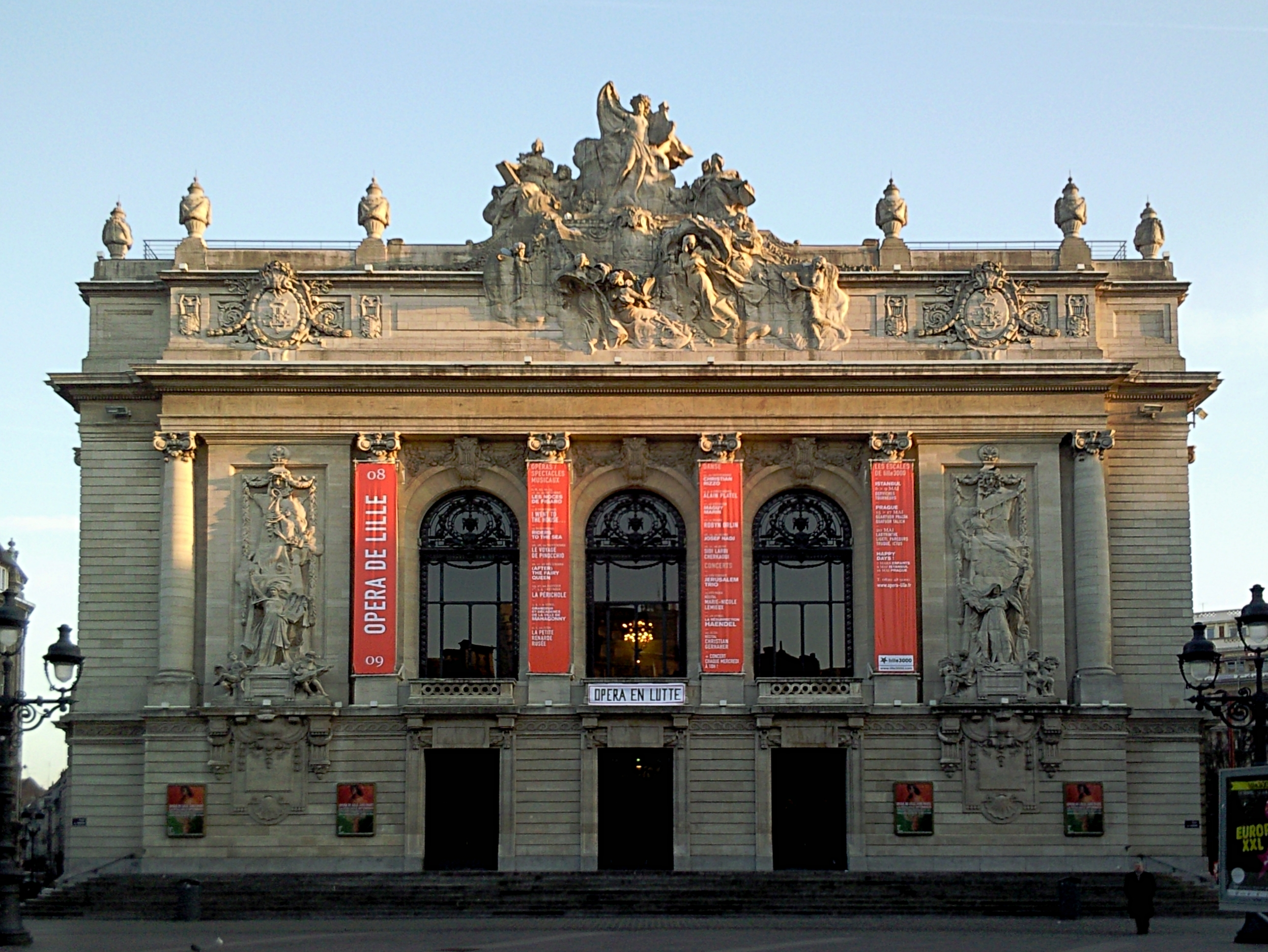 L'opéra de Lille (Nord). L'opéra en lutte...